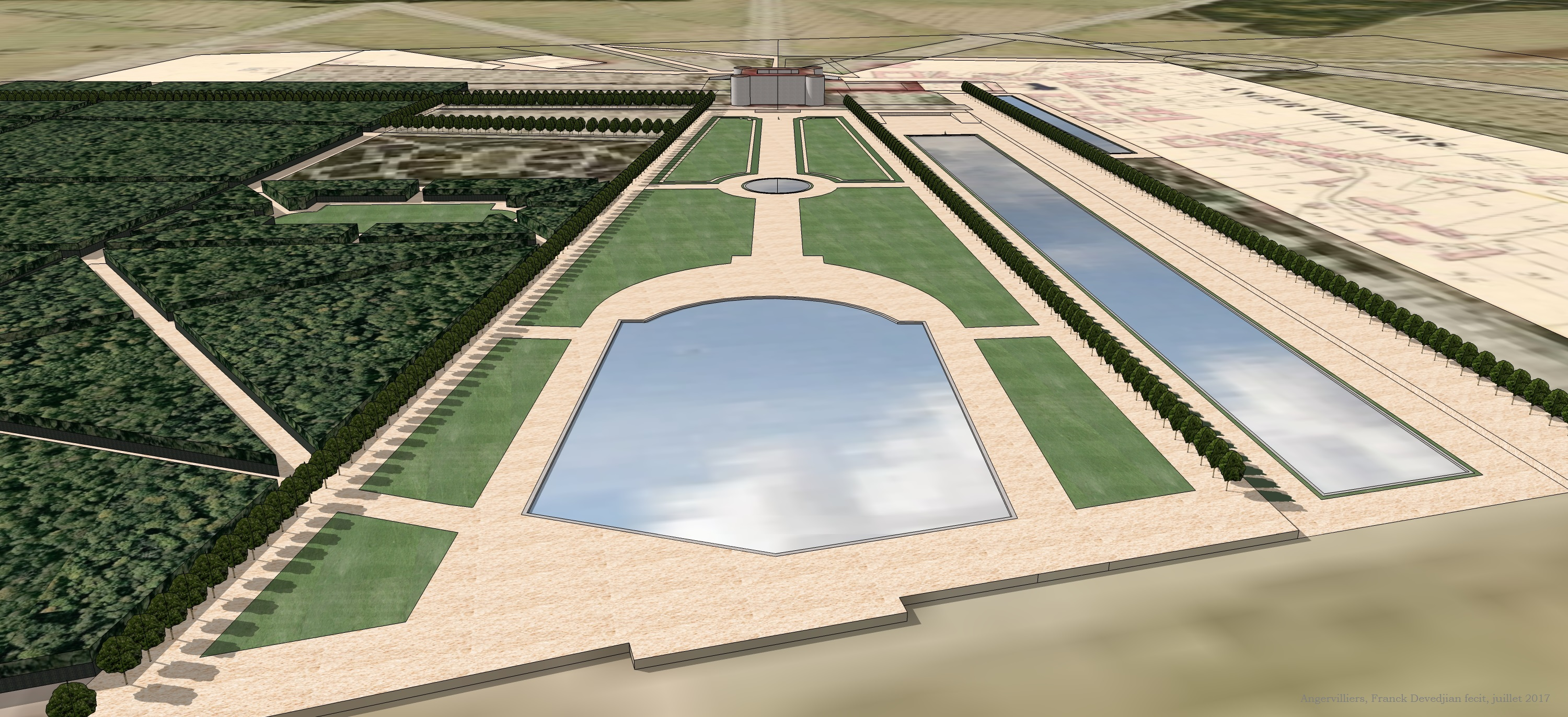 Vue cavalière d'Angervilliers depuis le bout du jardin.